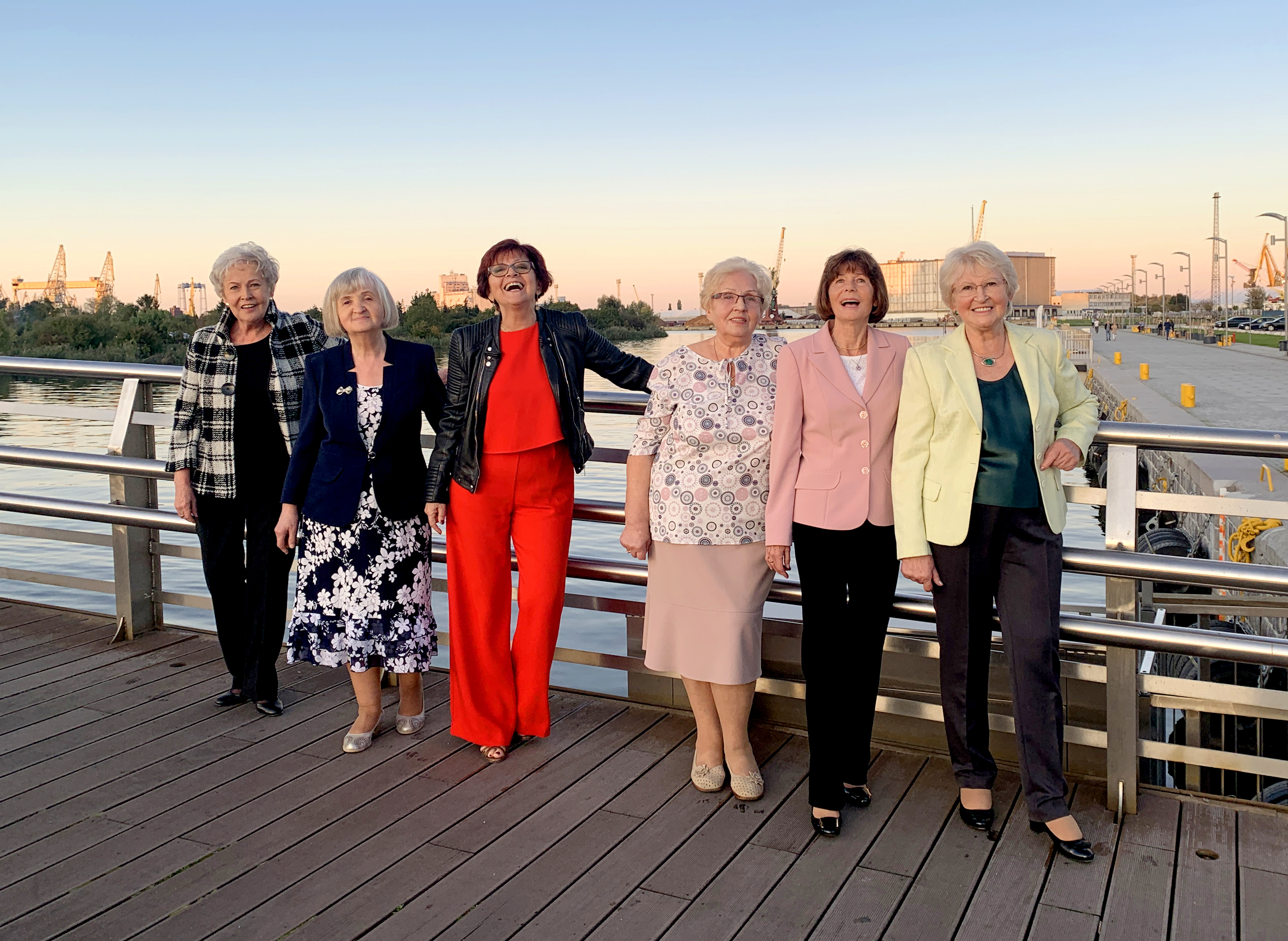 Zespół Filipinki podczas spotkania z okazji 60. rocznicy utworzenia grupy. Od lewej stoją: Elżbieta Klausz, Zofia Bogdanowicz-Kasprzyk, Niki Ikonomu, Halina Sztejner (śpiewała w zespole w latach 1959-1963), Anna Sadowa-Stroińska i Iwona Racz-Szczygielska